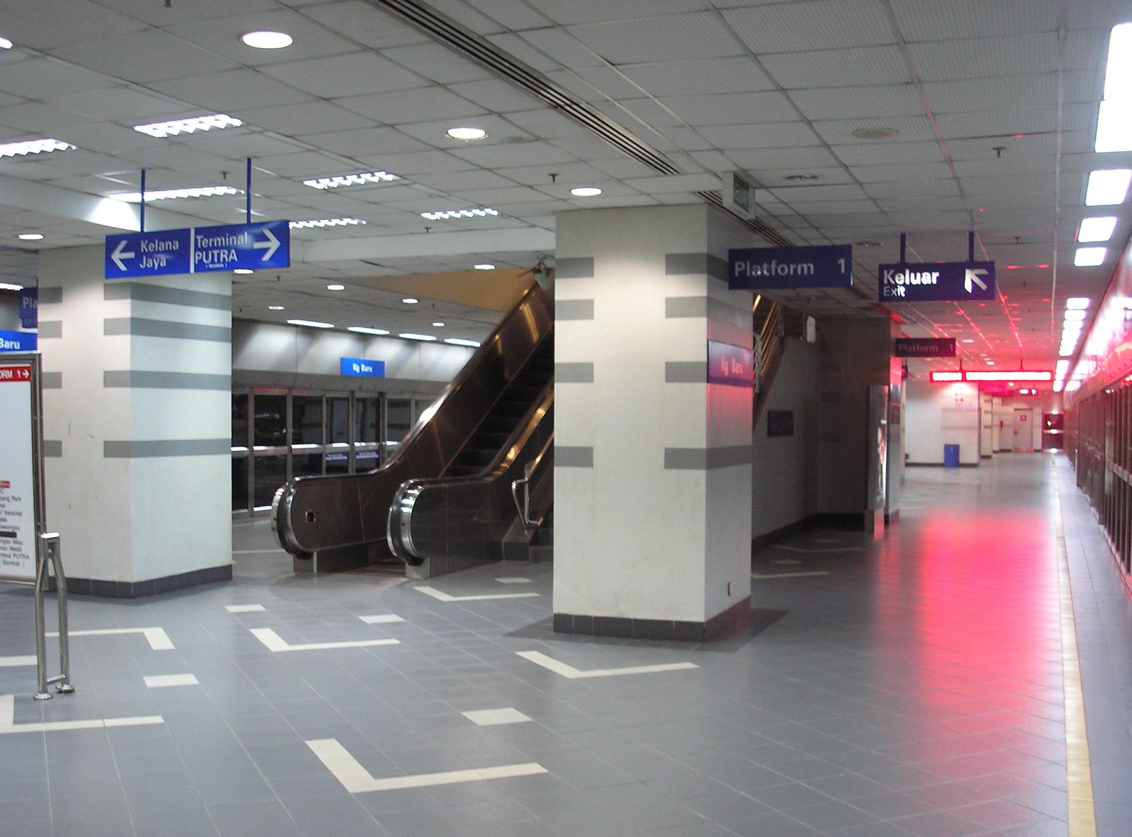 The Kampung Baru LRT station (Kelana Jaya Line), Kuala Lumpur, Malaysia.